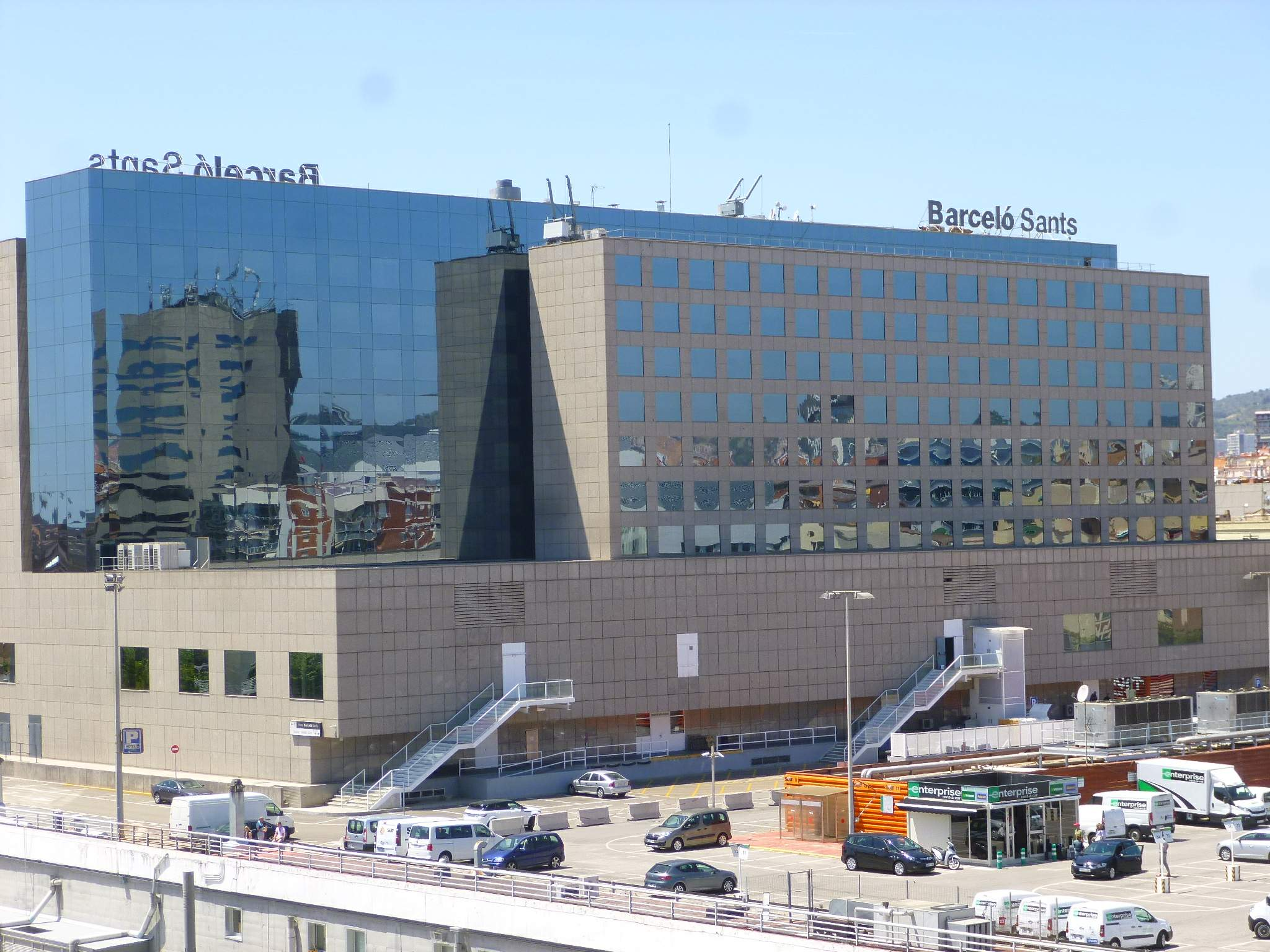 Barcelona - Estación de Sants y Hotel Barceló Sants